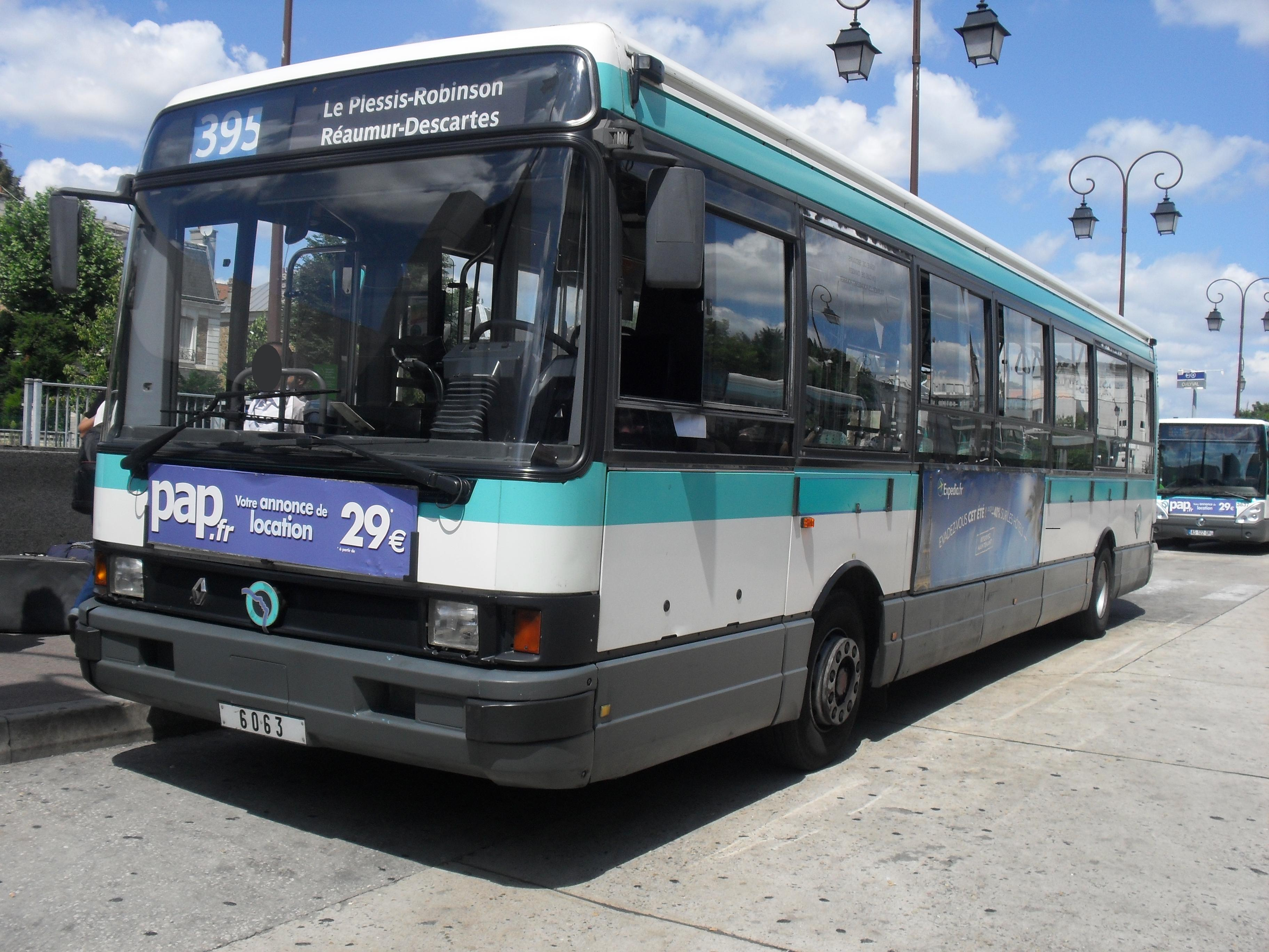 Ligne RATP 395